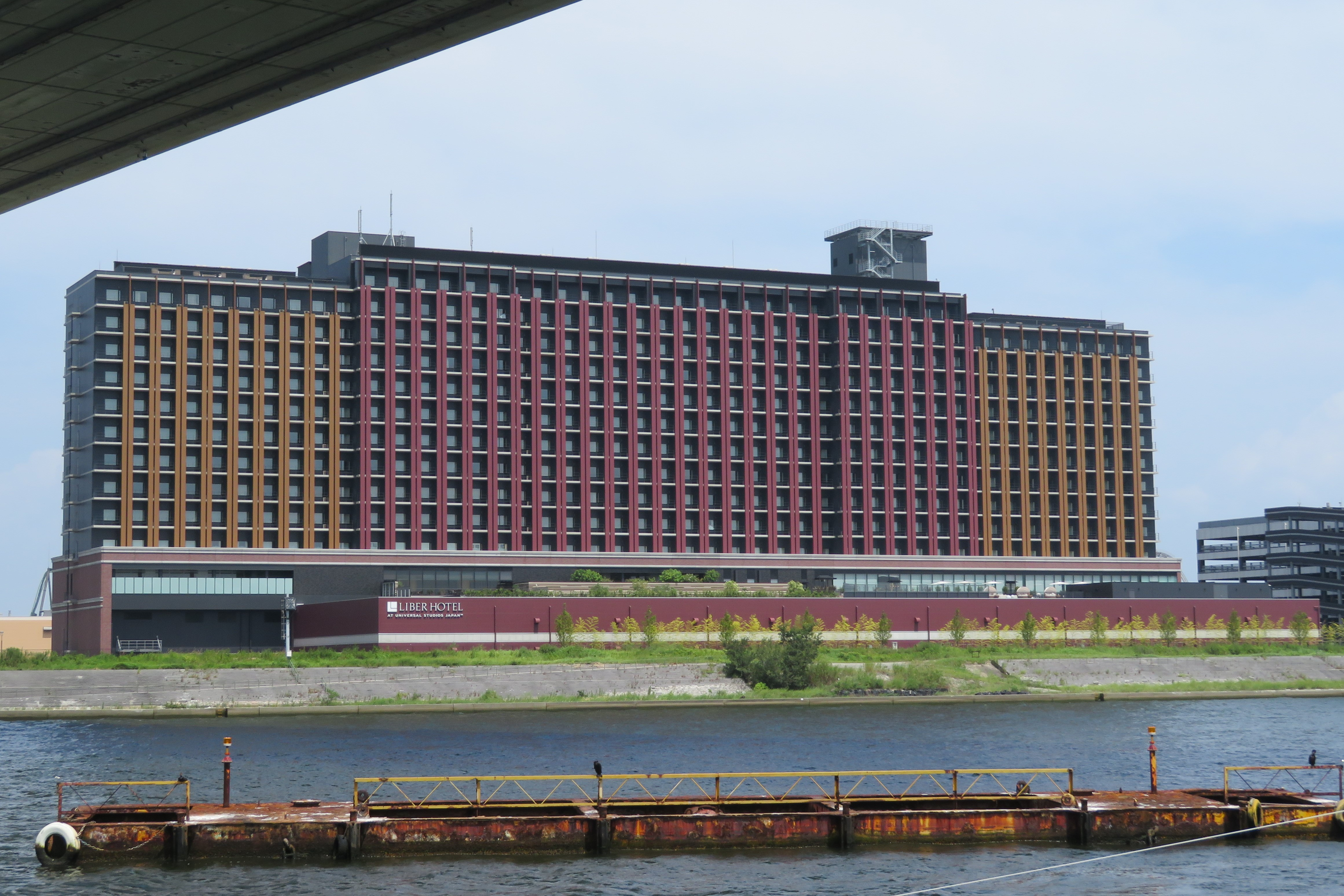 リーベルホテル アット ユニバーサル・スタジオ・ジャパン（天保山から撮影）